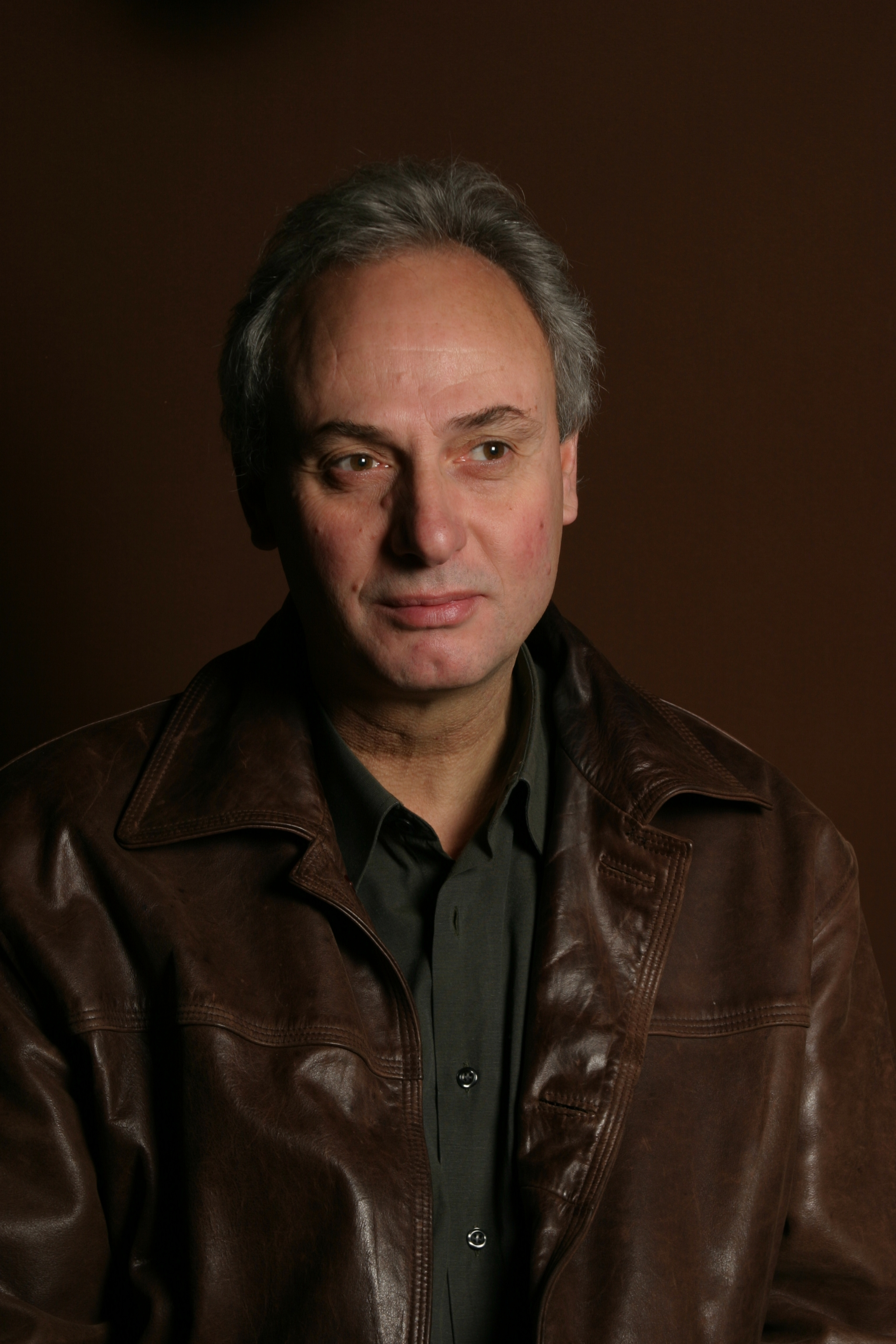 Agim Sopi, regjosor dhe skenarist